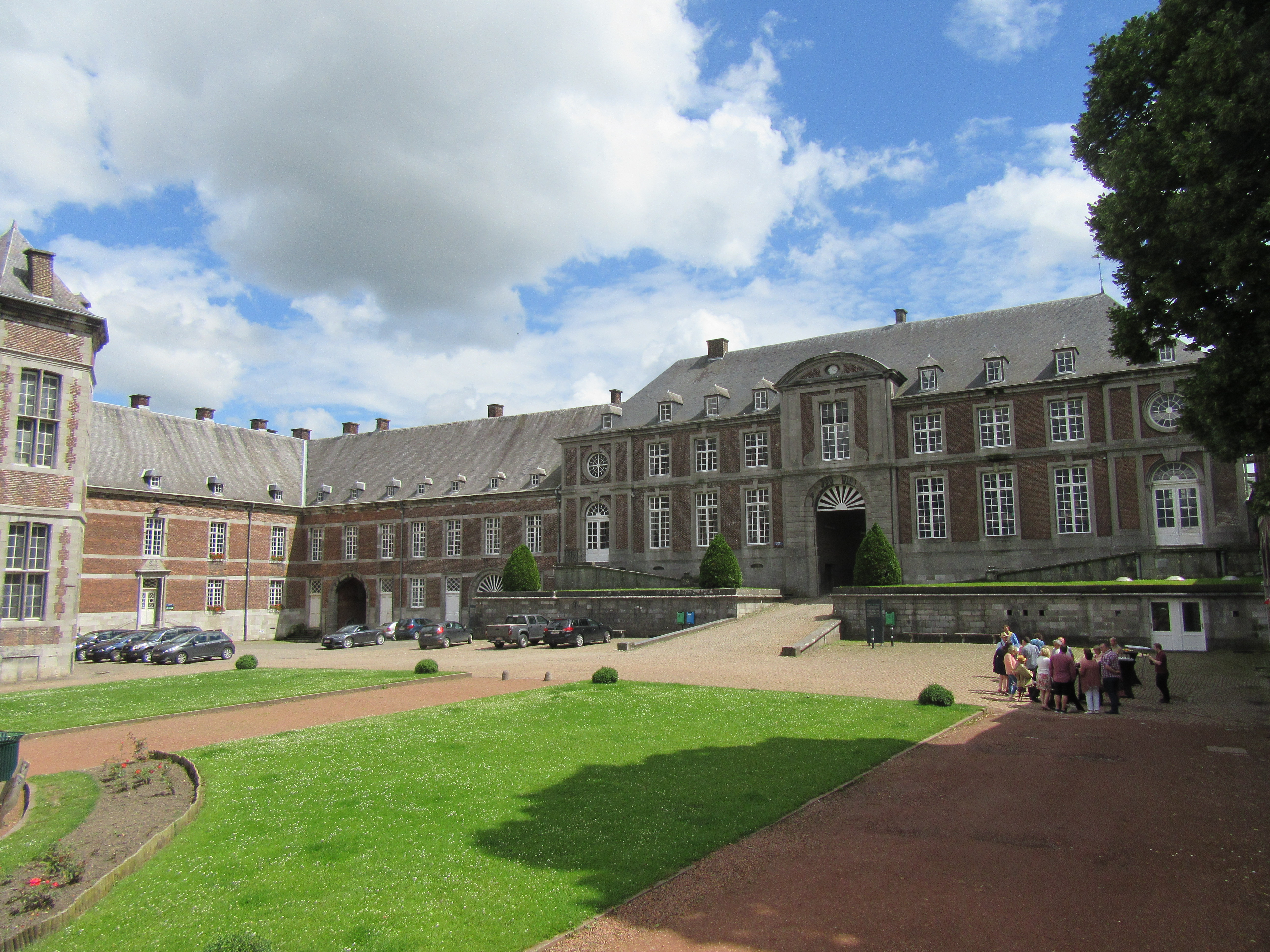 Façades des bâtisses de l'abbaye de Floreffe en Belgique